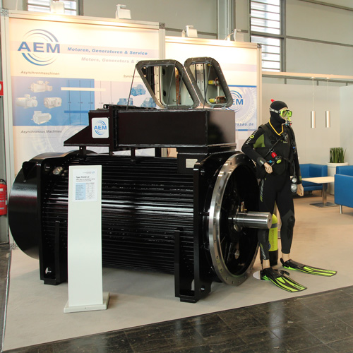 Messestand der AEM Dessau GmbH auf der Hannover Messe 2013